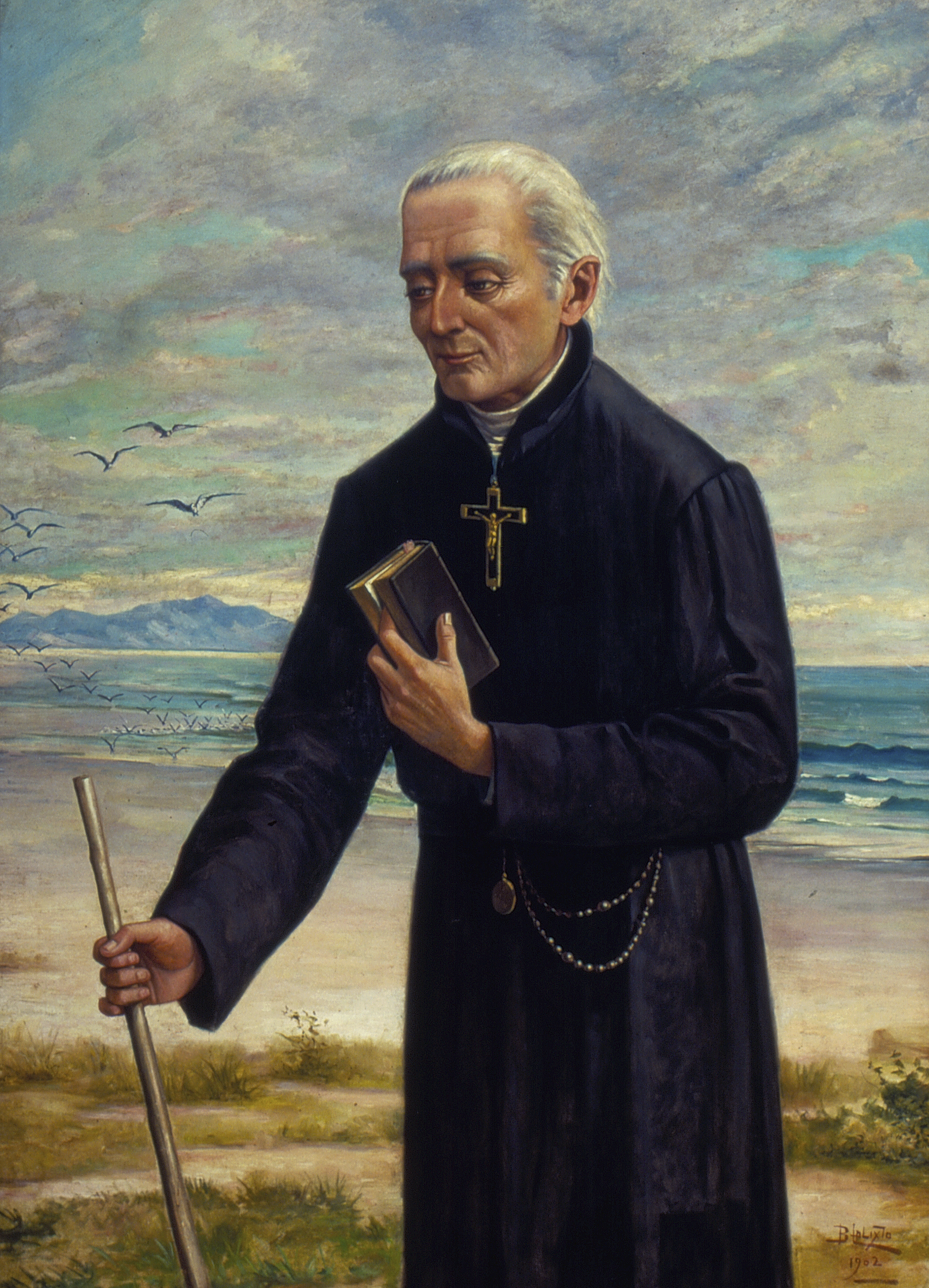 Obra que integra o acervo do Museu Paulista da USP. Coleção Benedito Calixto de Jesus - CBCJ